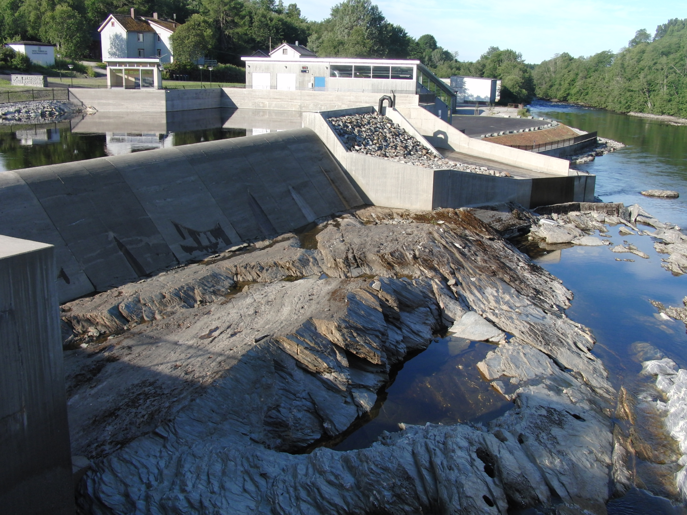 Byafossen nye kraftverk